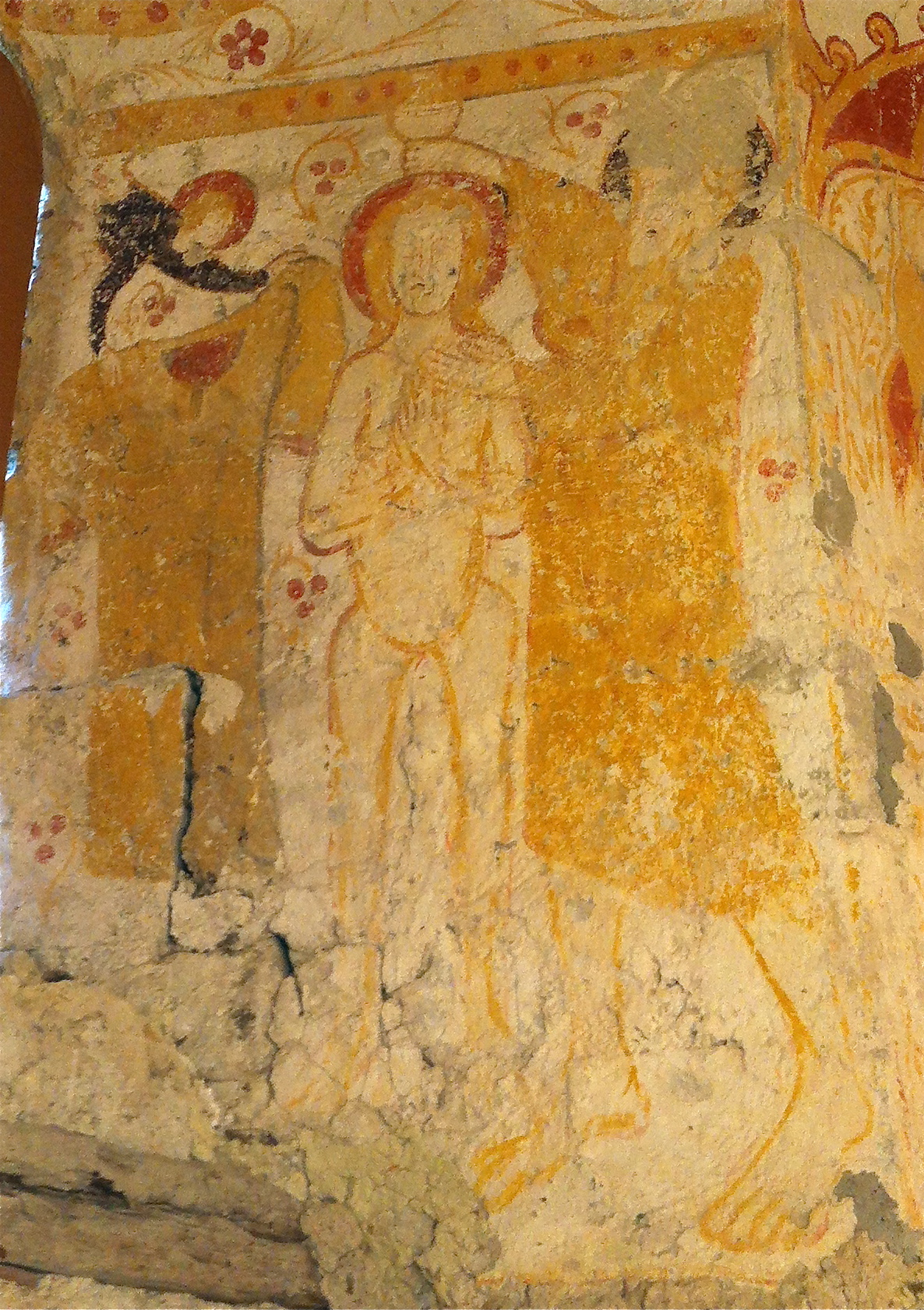 peinture du chœur de l'église Saint-André de Taxat - représentation d'un baptême